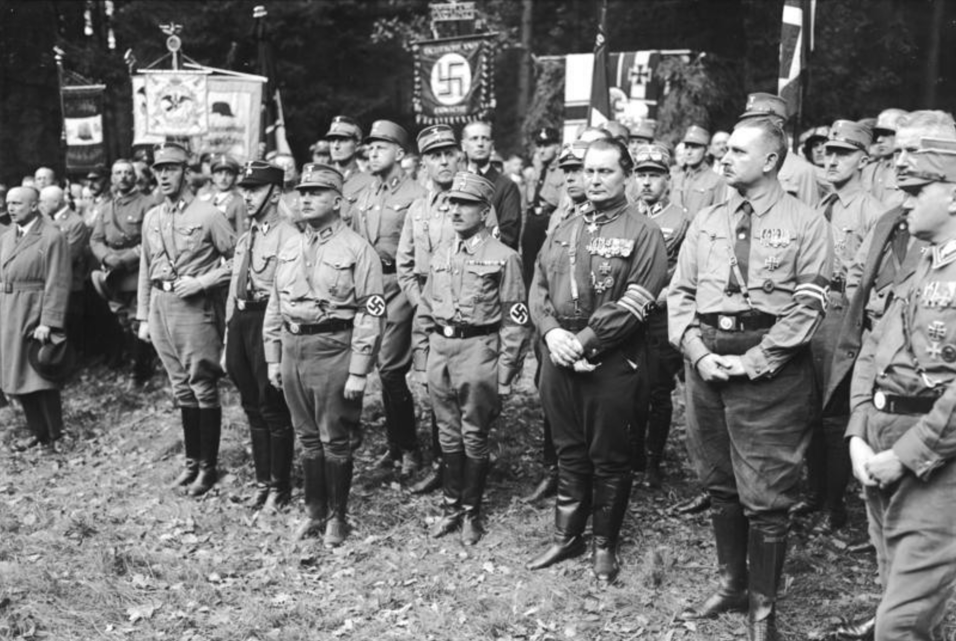 Gründung der "Harzburger Front" Bad Harzburg, 11.10.1931 Hauptmann Göring und Hptm. Röhm, ganz rechts der Preußische Kultusminister Bernhard Rust, (x)